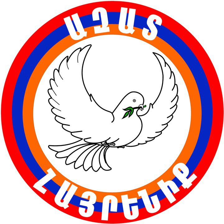 Freie Heimat